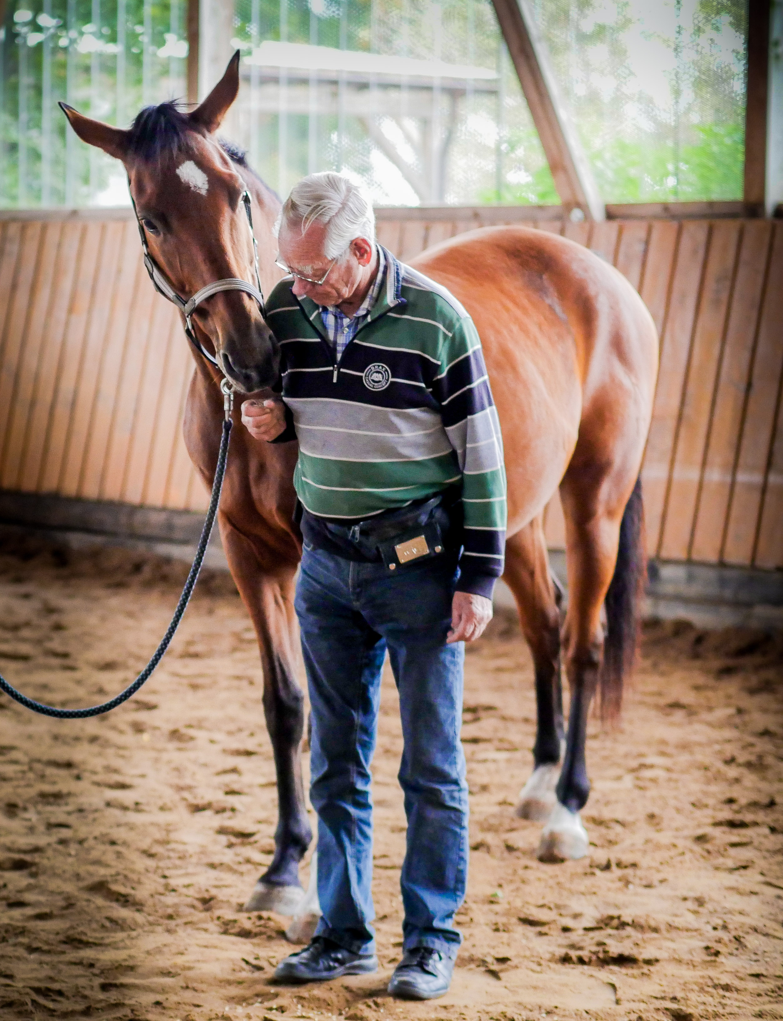 Peter Deicke, arbeiten mit Pferden. Zrikuslektionen, Belohnungsfüttern